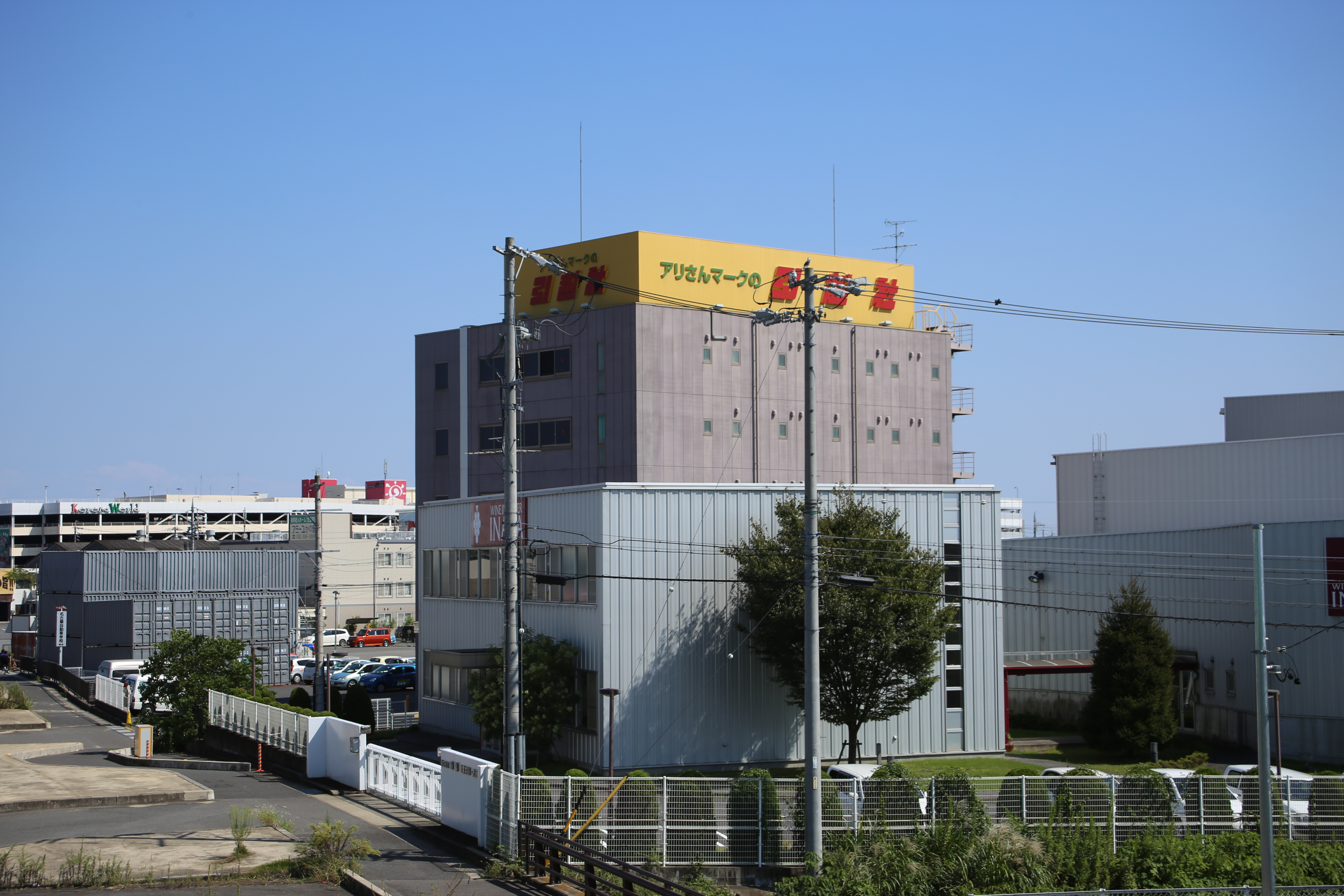 名古屋市中川区江松の引越社本社を西側公道歩道橋より撮影